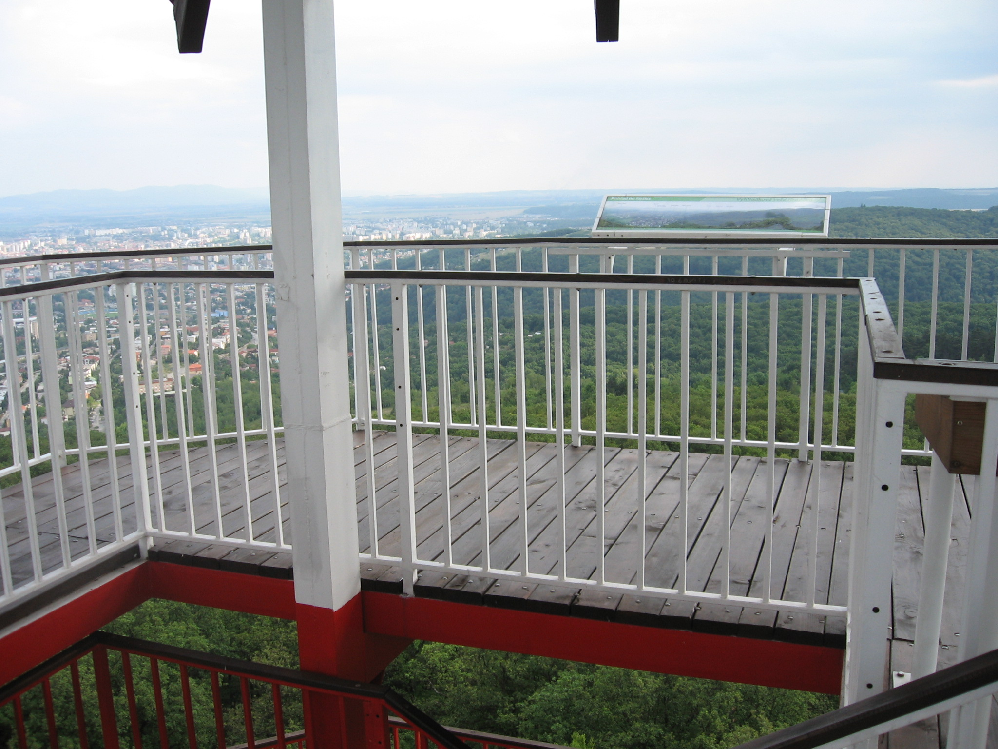 Pohľad z vyhliadkovej veže.